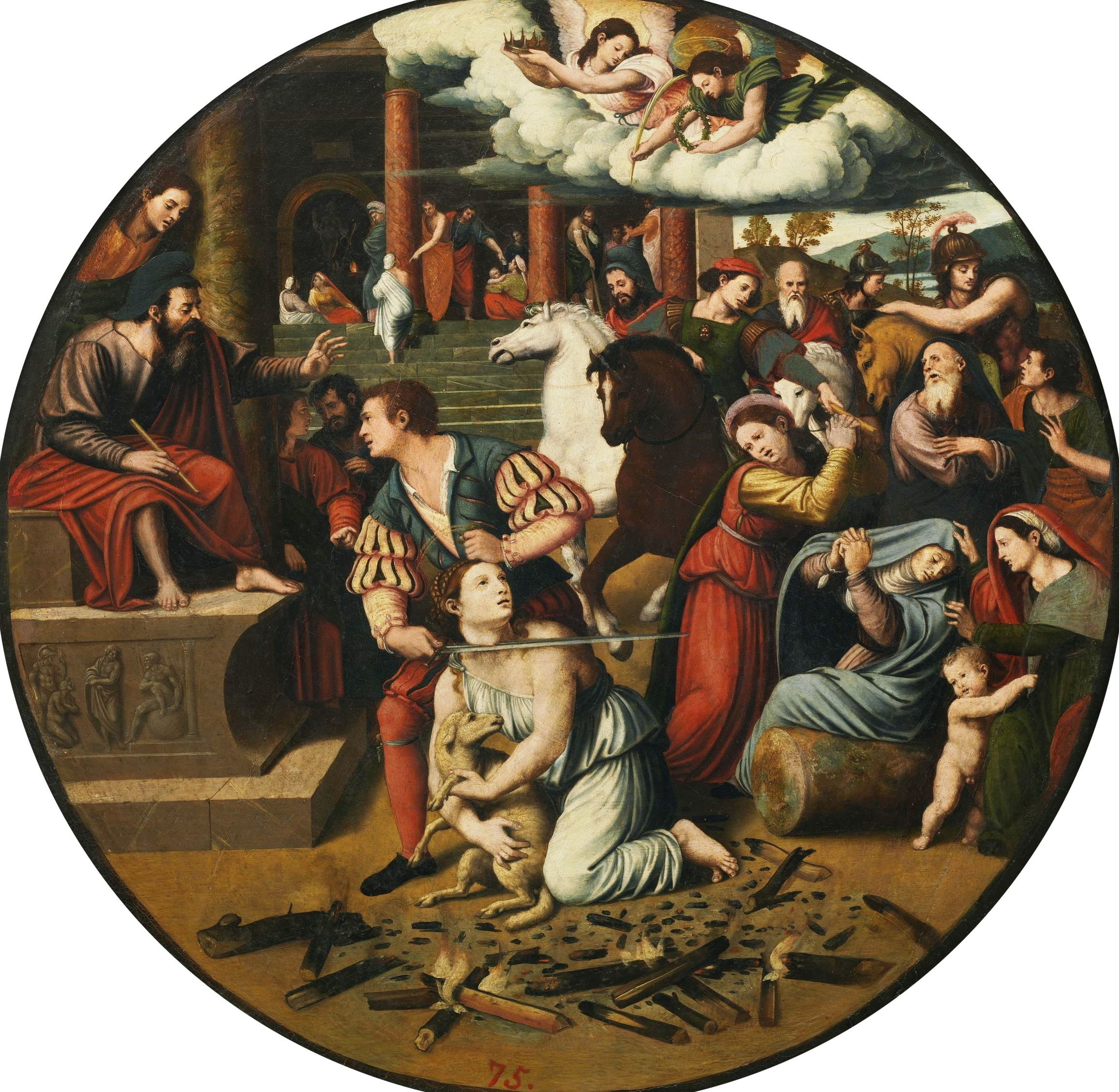 La obra representa el martirio de Santa Inés, que murió por profesar el cristianismo.